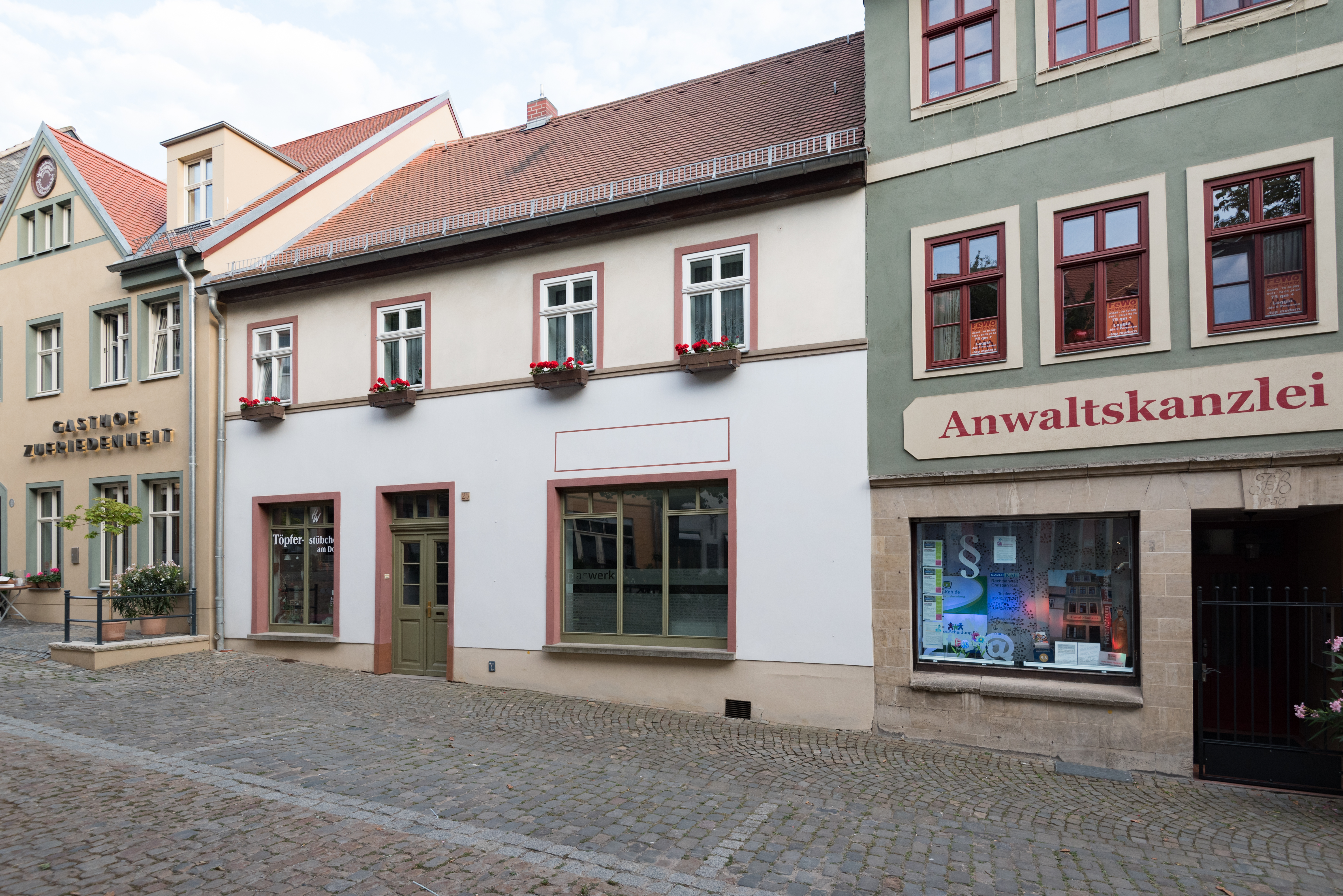 Naumburg (Saale), Steinweg 25